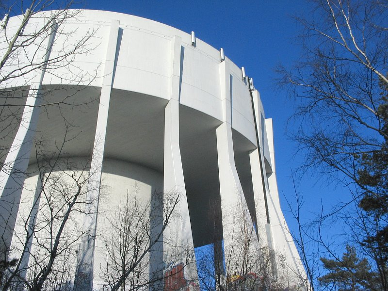 Foto:Bengt B